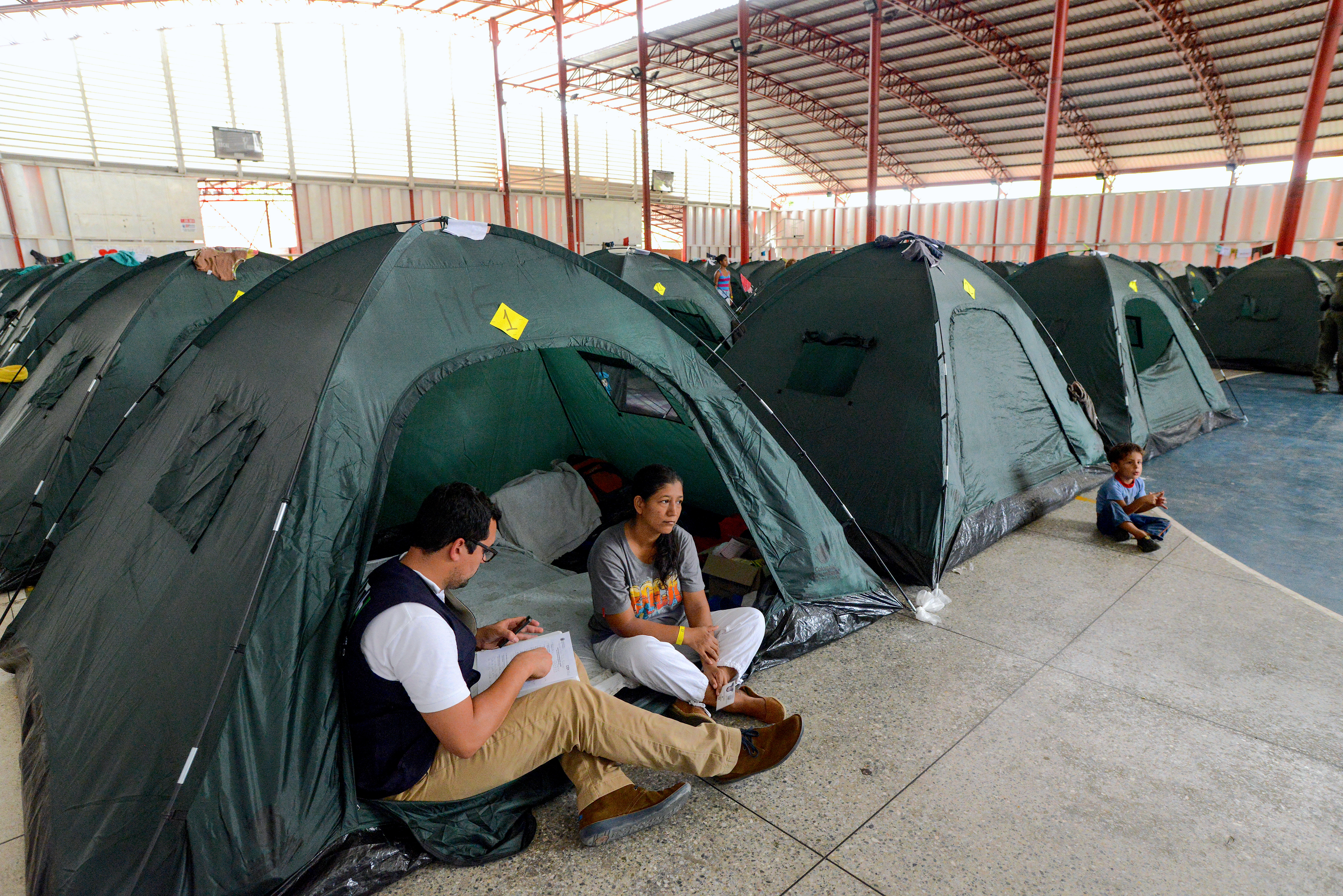 Recepción de testimonio en el albergue habilitado en la Universidad Francisco de Paula Santander.